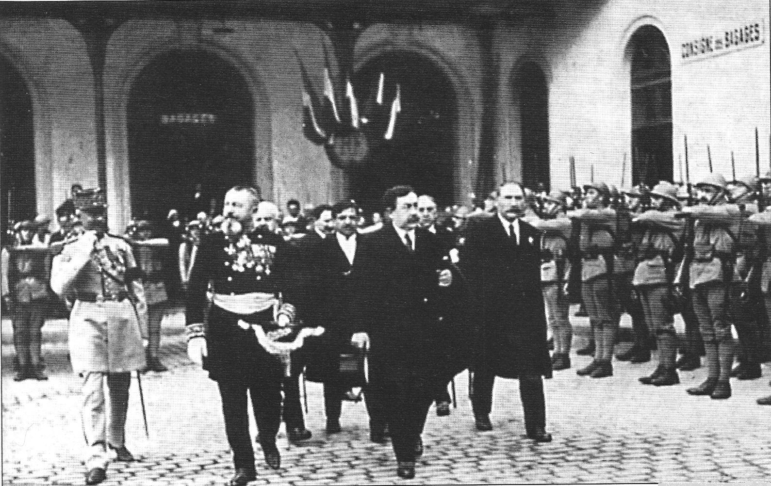 Le président du conseil des ministres, Paul Painlevé arrive le 21 mai 1925 en gare de Grenoble pour visiter l'exposition internationale de la houille blanche. A droite, le maire Paul Mistral, à sa gauche, le gouverneur de la place, général Demetz.